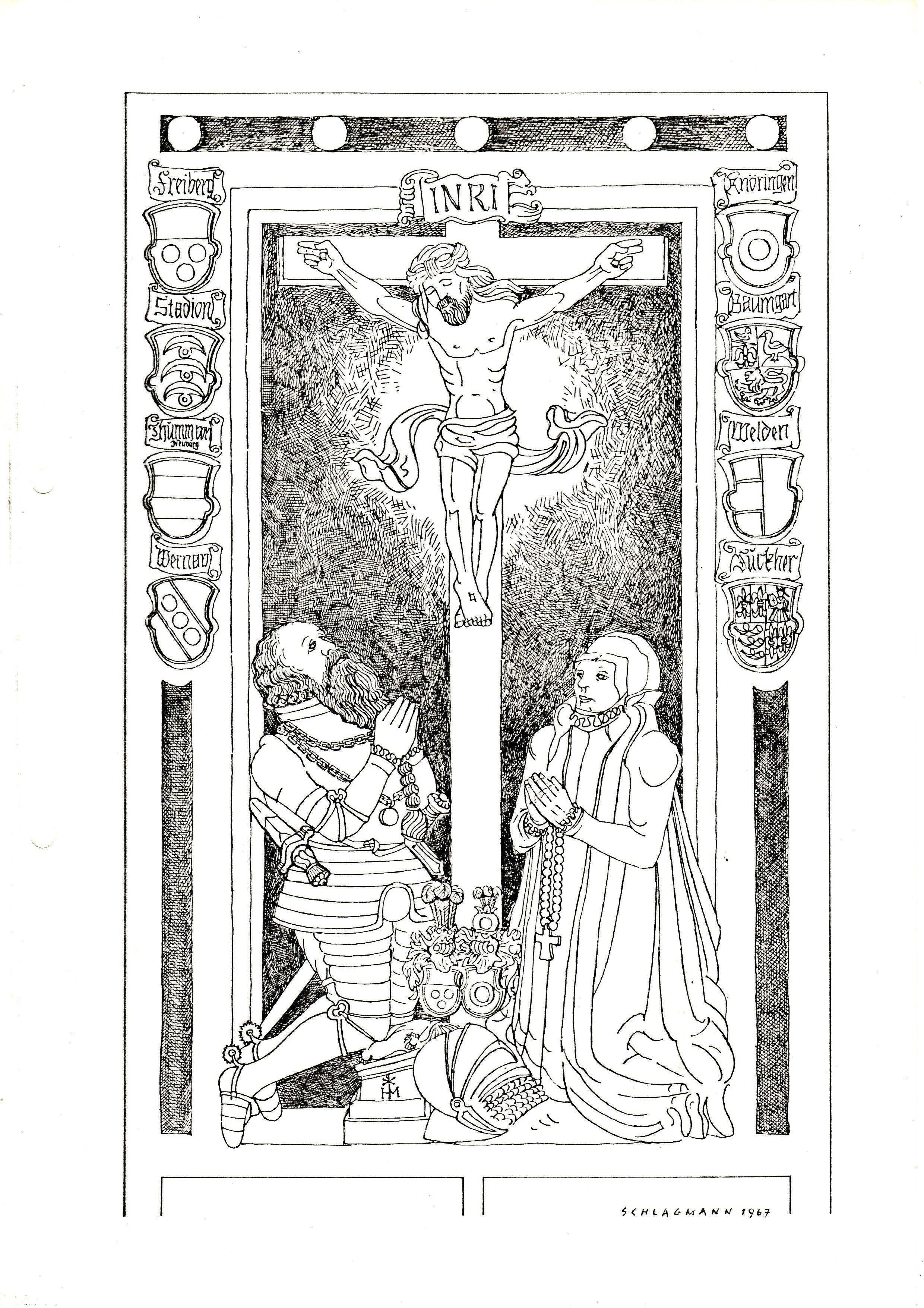 Epitaph für Johann Sigmund von Freyberg-Eisenberg zu Hopferau († 1589) in der St. Anna-Kapelle in Füssen